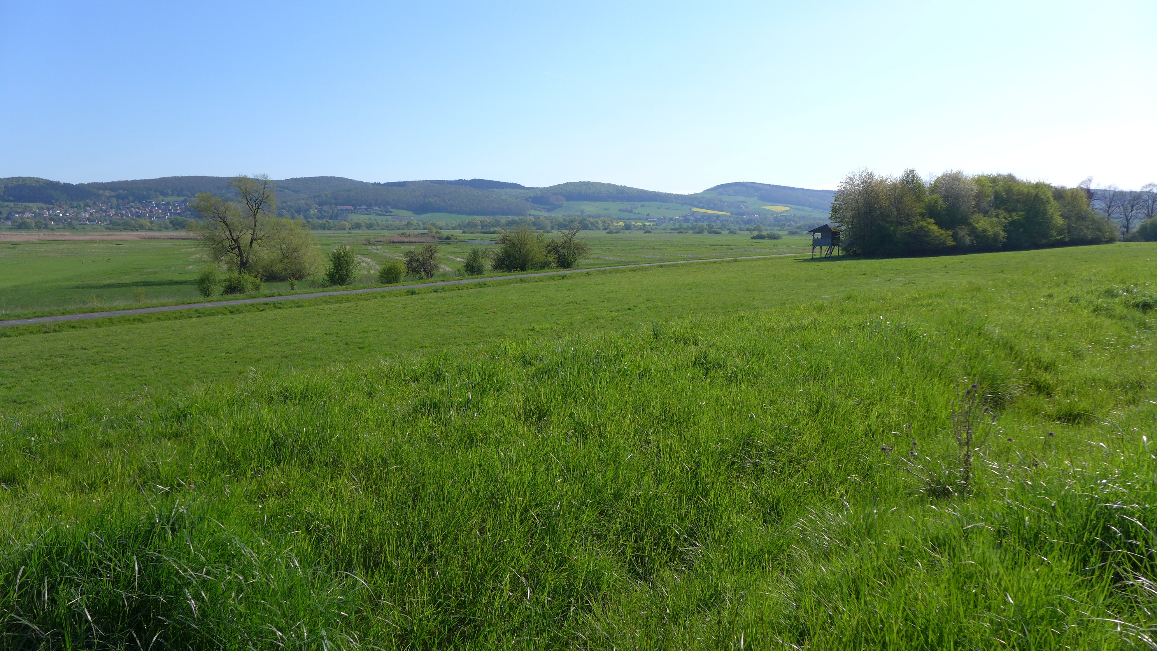 EU-Vogelschutzgebiet DE-4225-401. Zugleich Naturschutzgebiet Polder I im Hochwasserrückhaltebecken Salzderhelden BR 097 (nördliche Teilfläche). Aufnahmestandort zwischen Immensen und Sülbeck. Rechts die dortige Vogelbeobachtungshütte. Hinten links Wohnbebauung Salzderhelden.